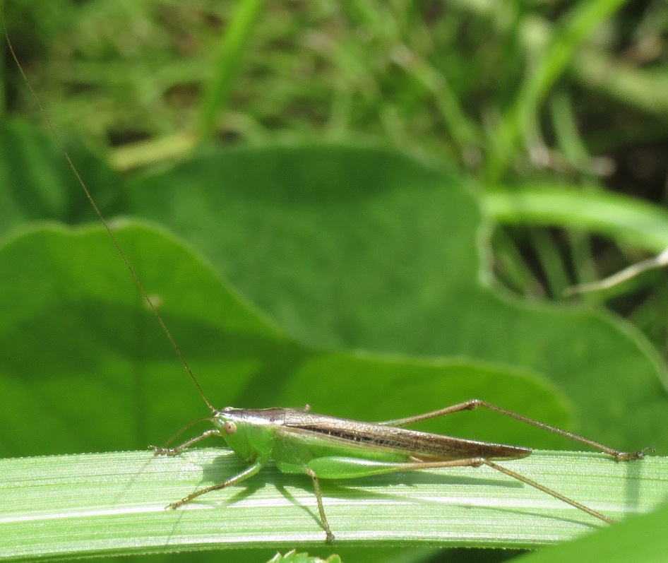 ホシササキリ